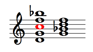 akord kwartowy bez dźwięku c, tj. akord eliptyczny po sprowadzeniu do postaci tercjowej